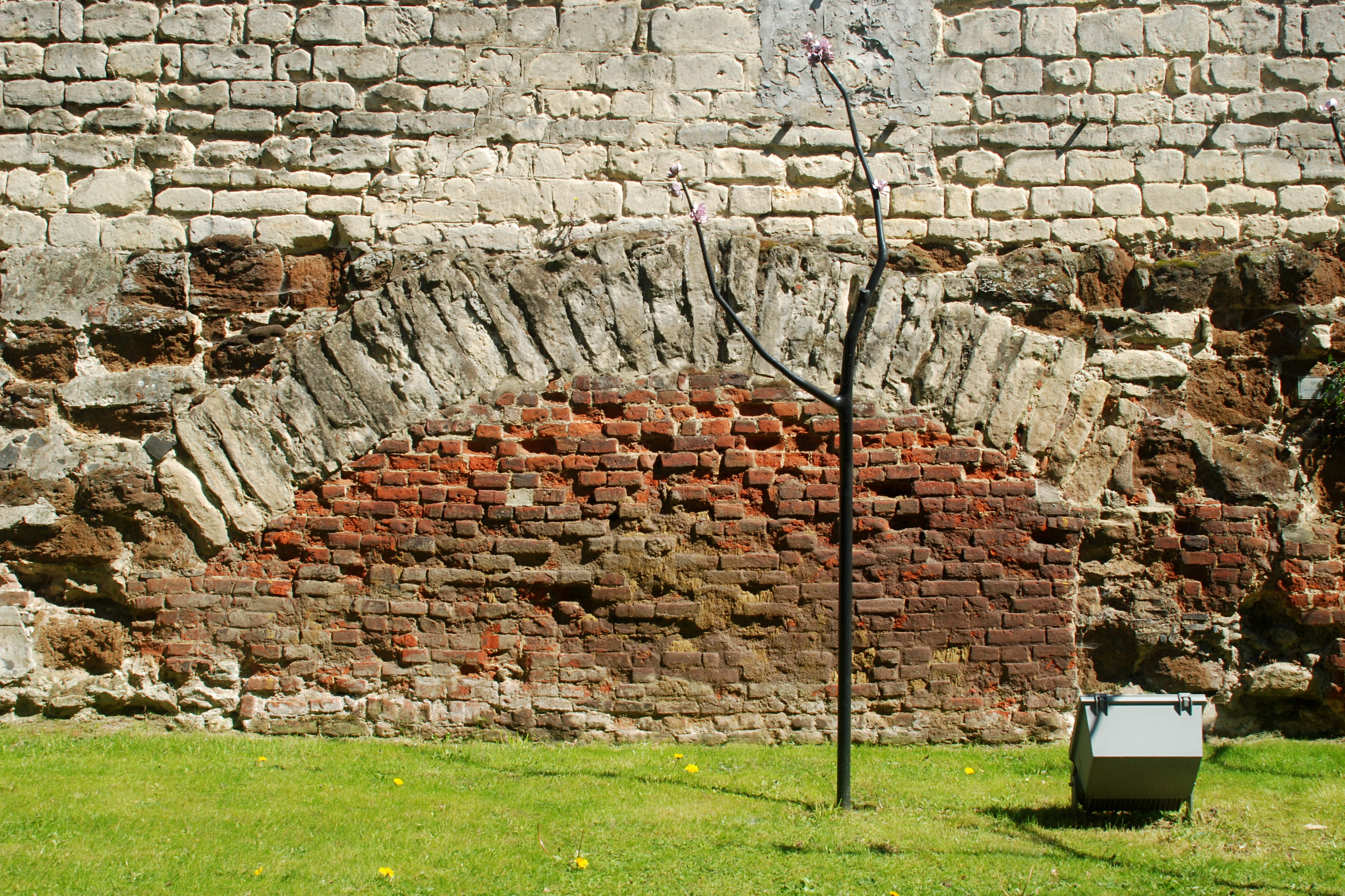 Belgique - Brabant flamand - Louvain - Première enceinte de Louvain - Rue de Redingen